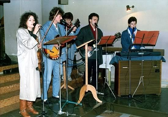 Početna postava Shaloma iz 1988.